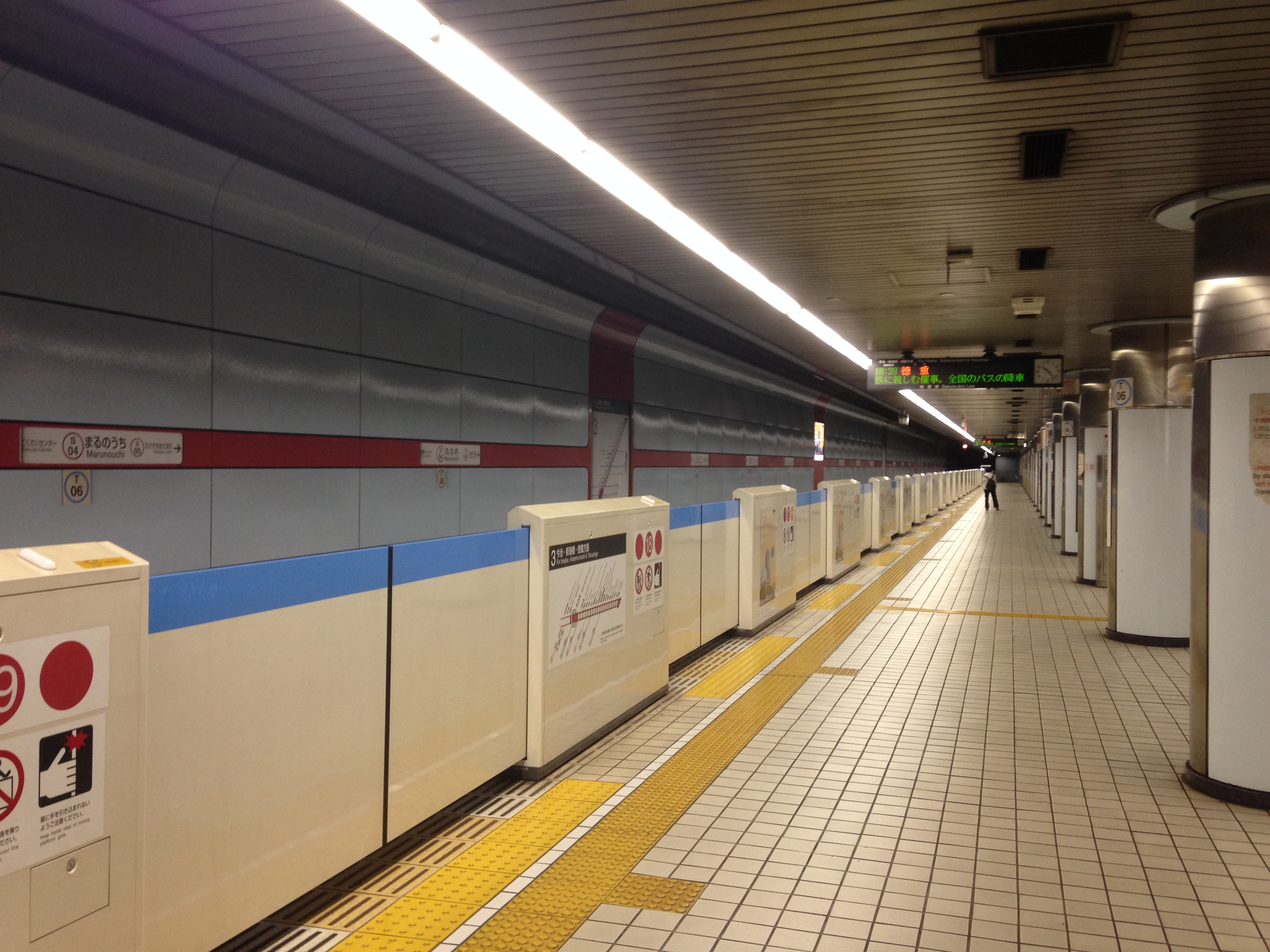 丸の内駅(桜通線)のホーム